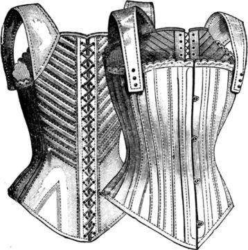 Korset med rygstiver for piger på 12-13 år